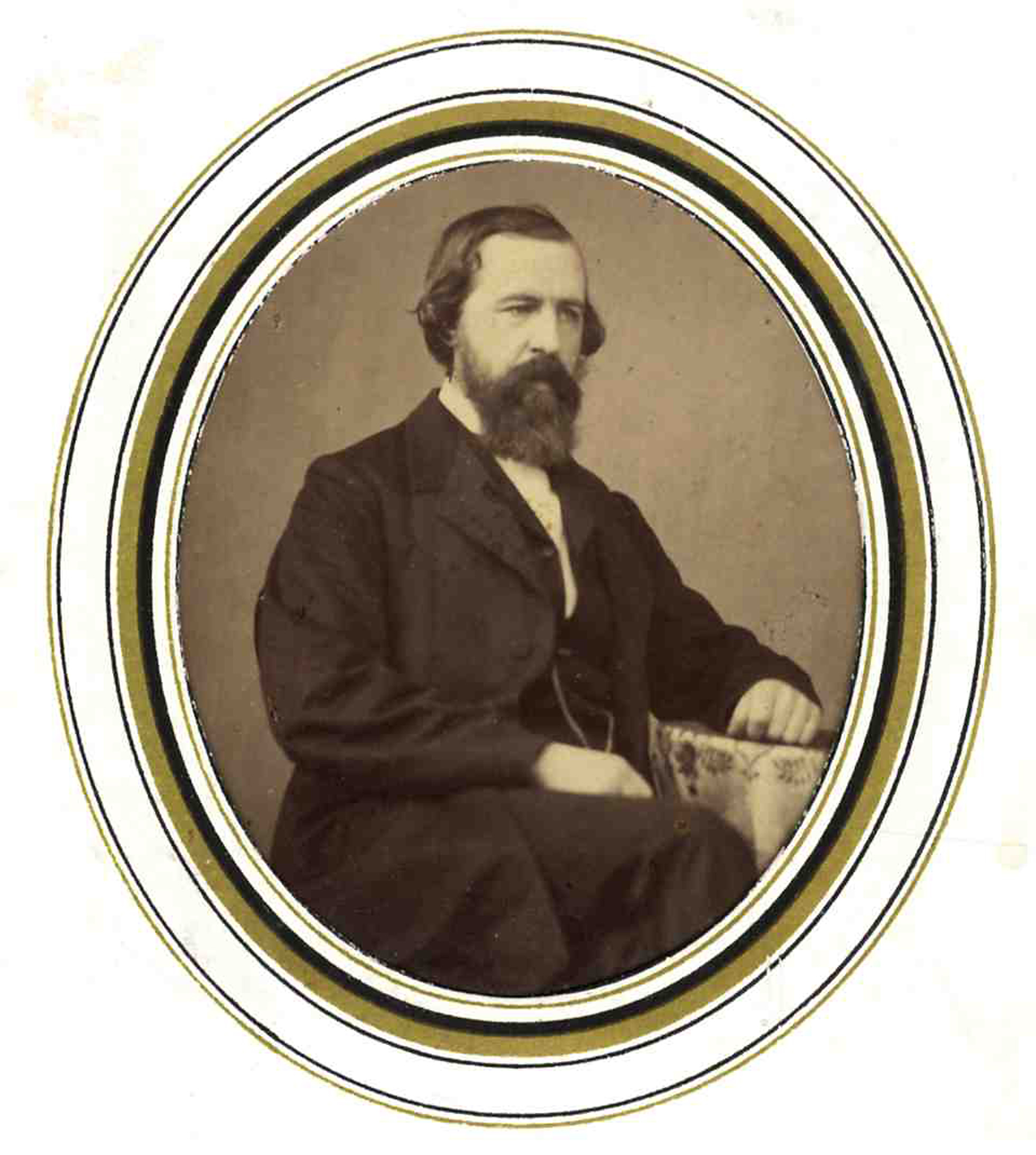 Fotografie von Dr. med. Peter Willers Jessen (1793-1875)